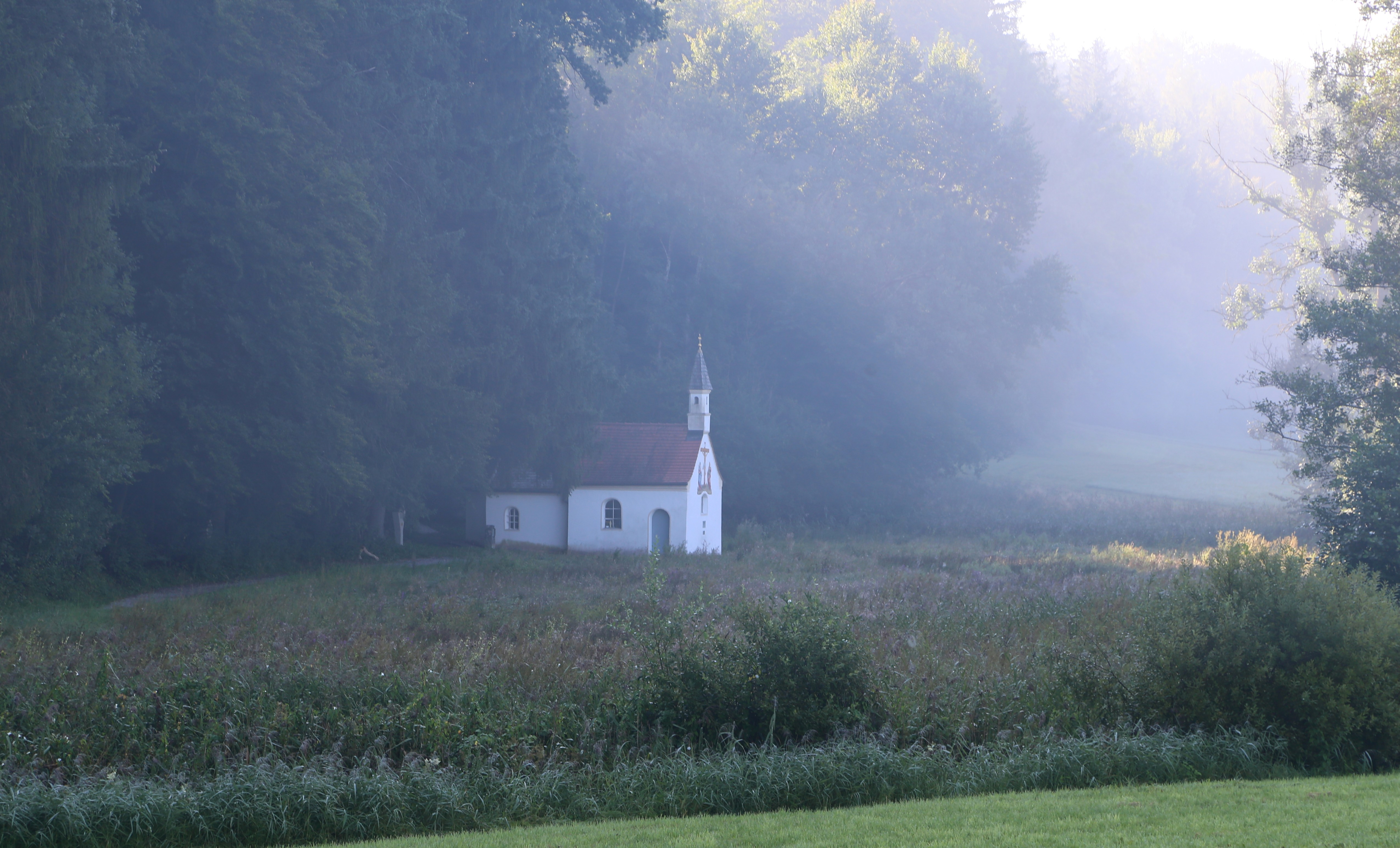 Wallfahrtskapelle Frauenbründl, Gemeinde Baiern; kleiner Putzbau mit stark eingezogenem geradem Chor und massivem Fassadenreiter, 17. Jahrhundert, um 1712 erweitert und um 1857 erneuert; mit Ausstattung